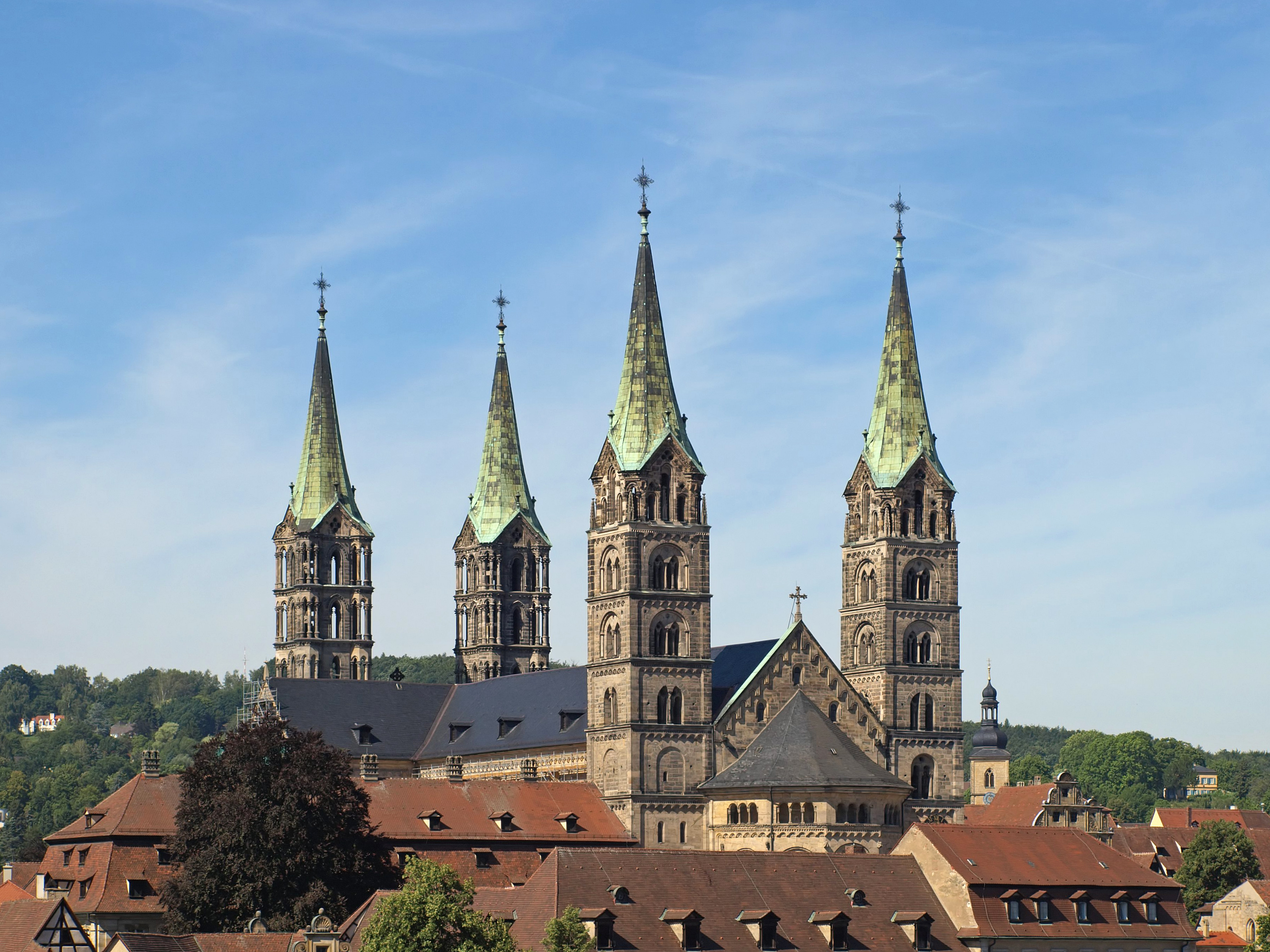 Die vier Türme des Bamberger Domes vom Turm des Schlosses Geyerswörth aus gesehen